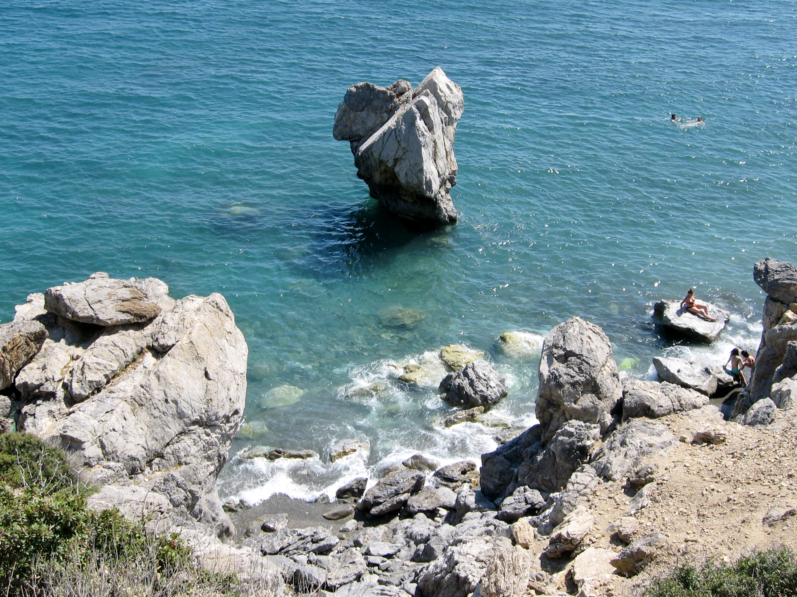 Pilzförmiger Felsen Viglatoras am Palmenstrand von Preveli, Gemeinde Agios Vasilios, Regionalbezirk Rethymno, Kreta, Griechenland